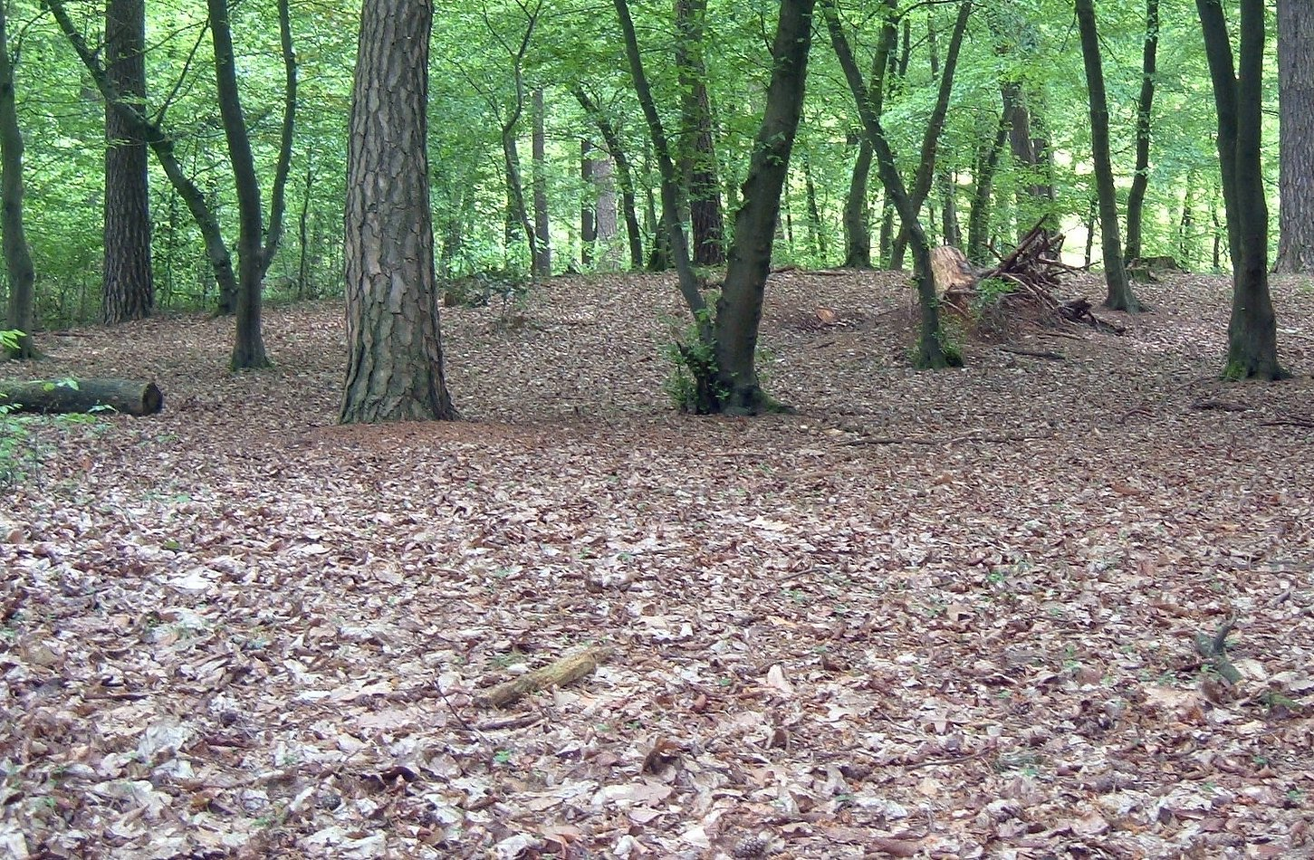 Hügelgrab im Königsforst, Bereich im Naturschutzgebiet „Königsforst“ (NSG K-020) in Köln. Text der öffentlich installierten Infotafel: Früheisenzeitliches Grabhügelfeld mit Brandbestattungen der niederrheinischen Variante der Hallstatt-Kultur (7. und 6. Jh. v. Chr.). Von dem ursprünglich sehr großen, ehemals sich bis zum Mauspfad erstreckenden vorgeschichtlichen Friedhof sind nur noch 51 Grabhügel erhalten, die alle bereits vor über 50 Jahren ausgegraben wurden. Die Funde werden im Römisch-Germanischen Museum der Stadt Köln verwahrt.